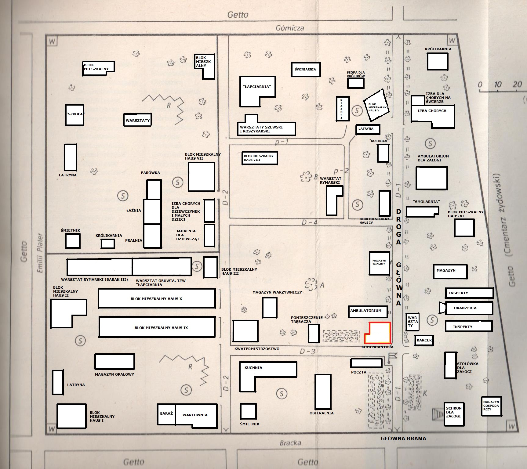 Plan obozu przy ul. Przemysłowej na bazie planu opracowanego przez Józefa Witkowskiego, autora książki "Hitlerowski obóz koncentracyjny dla małoletnich w Łodzi", W-wa 1975, po str. 56.